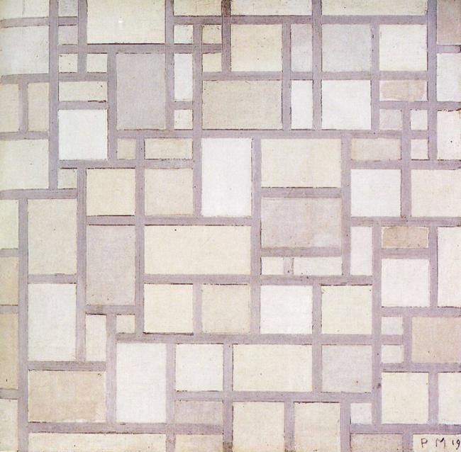 Kompozicija s rešetkom 7